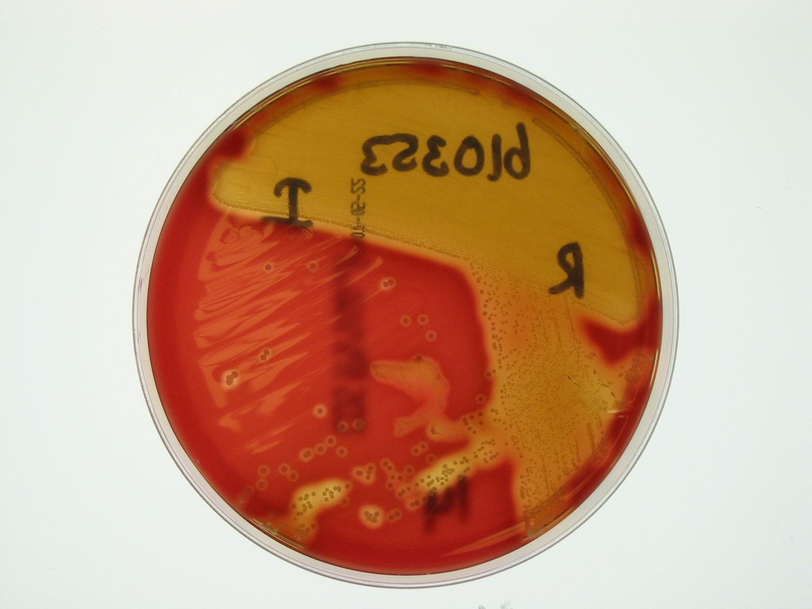 eigen werk; geen rechten